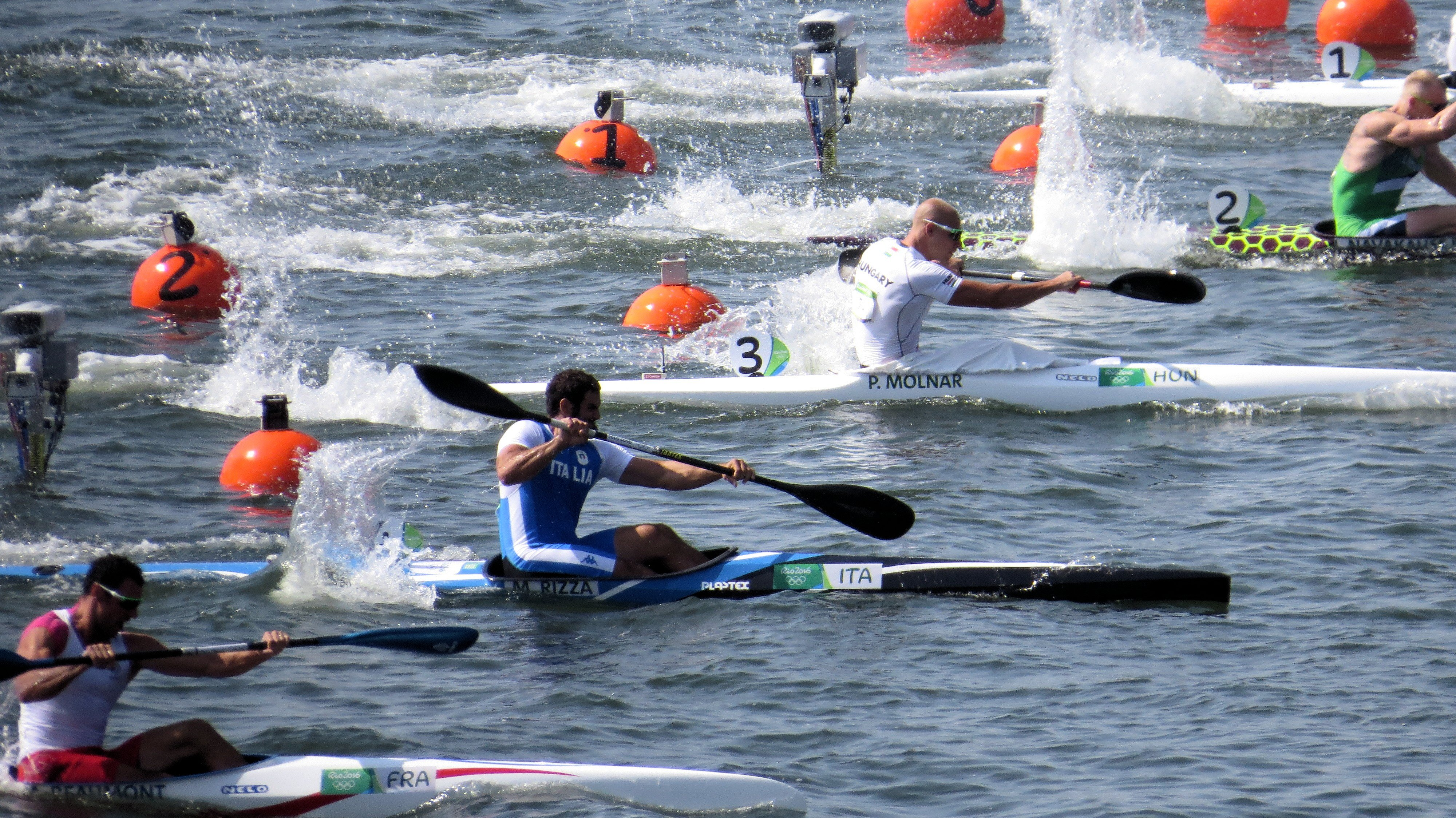 Sx50